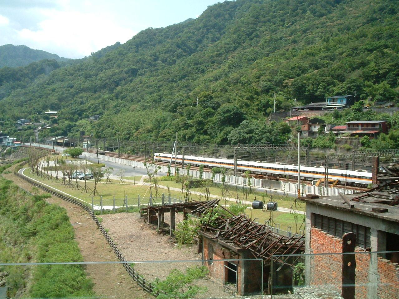 中文（台灣）: 猴硐煤礦博物園區與臺灣鐵路管理局宜蘭線。